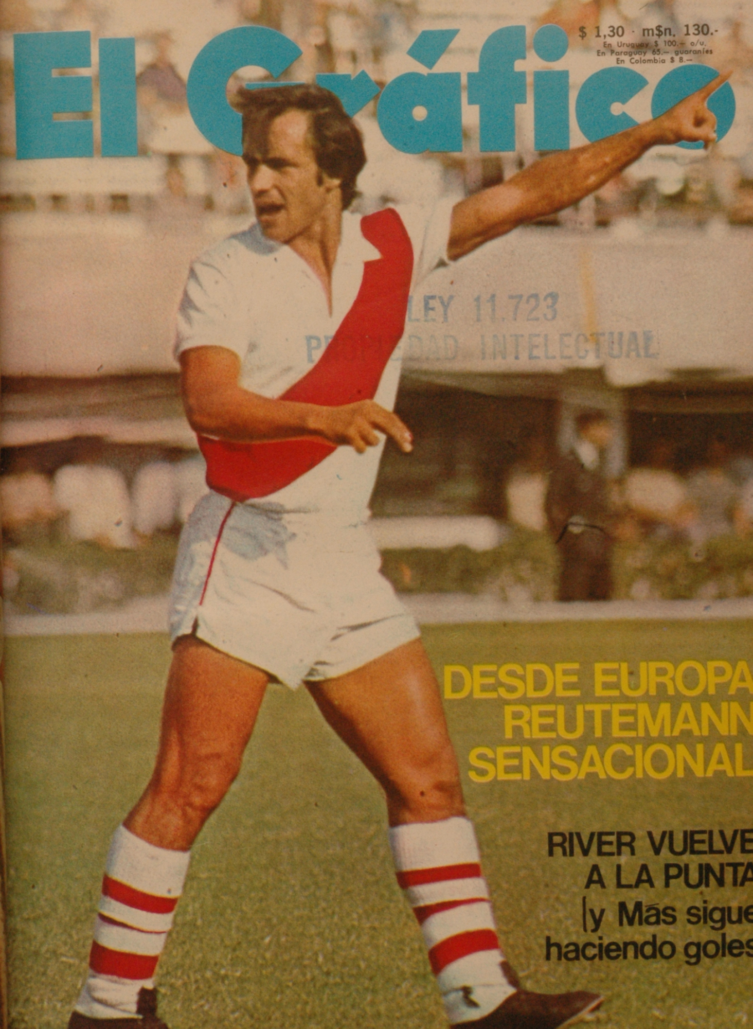 El Grafico del 18 de Mayo de 1971. Edicion 2693